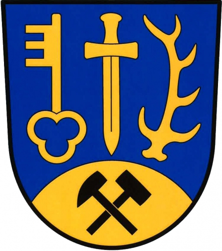 Znak, Rančířov, okres Jihlava